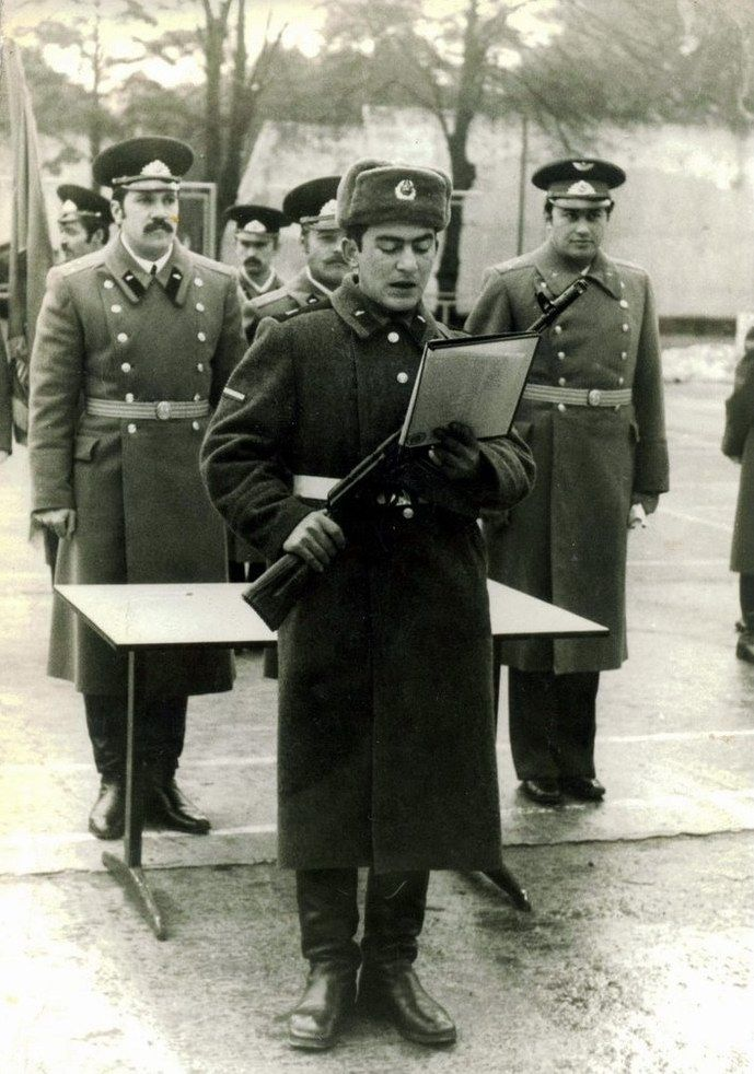 Soldaten der Gruppe der Sowjetischen Streitkräfte in Deutschland in Perleberg in den frühen 1980er-Jahren.